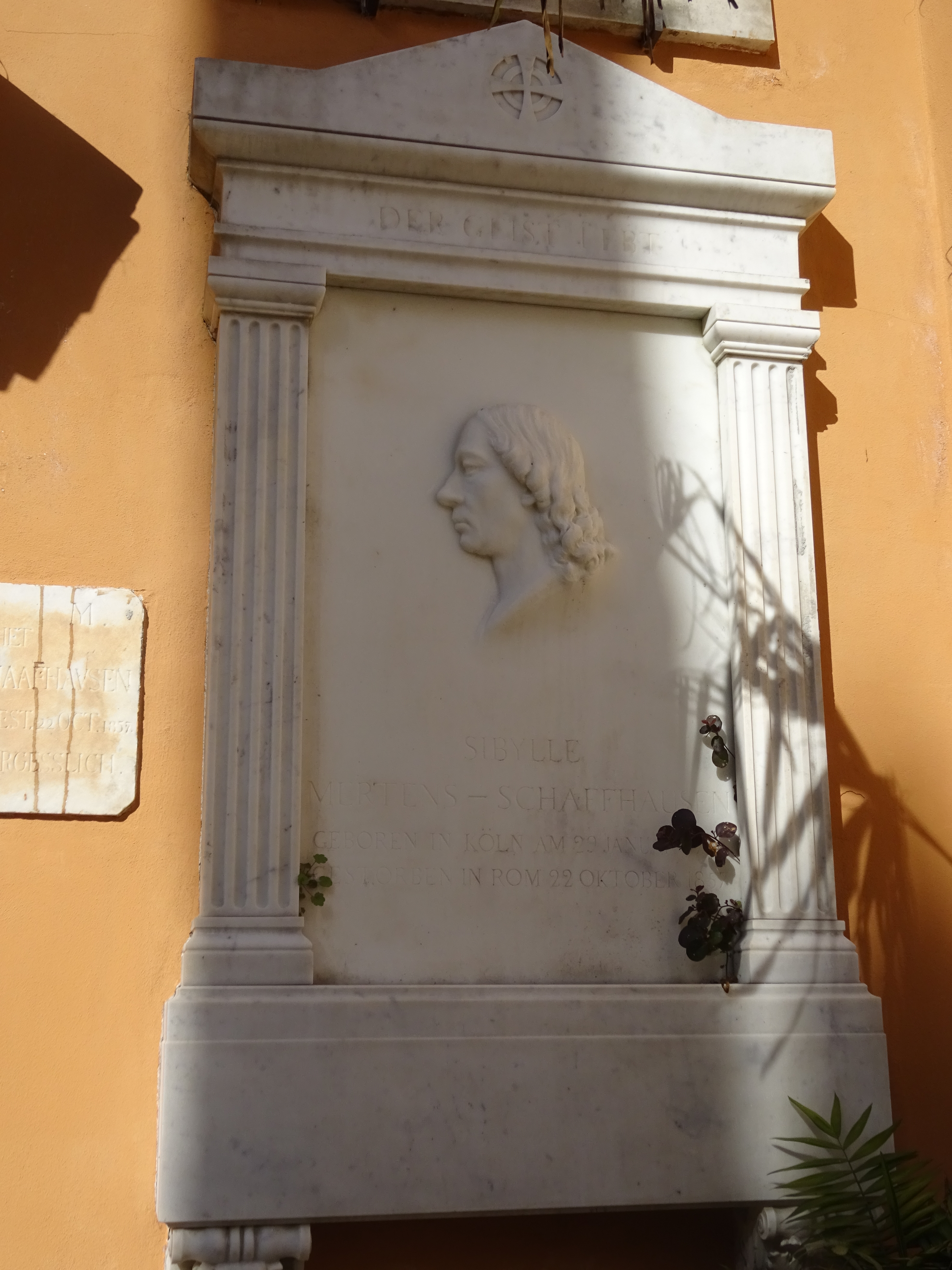 Grabstätte der Sybille Mertens-Schaaffhausen auf dem Friedhof Campo Santo Teutonico in Rom